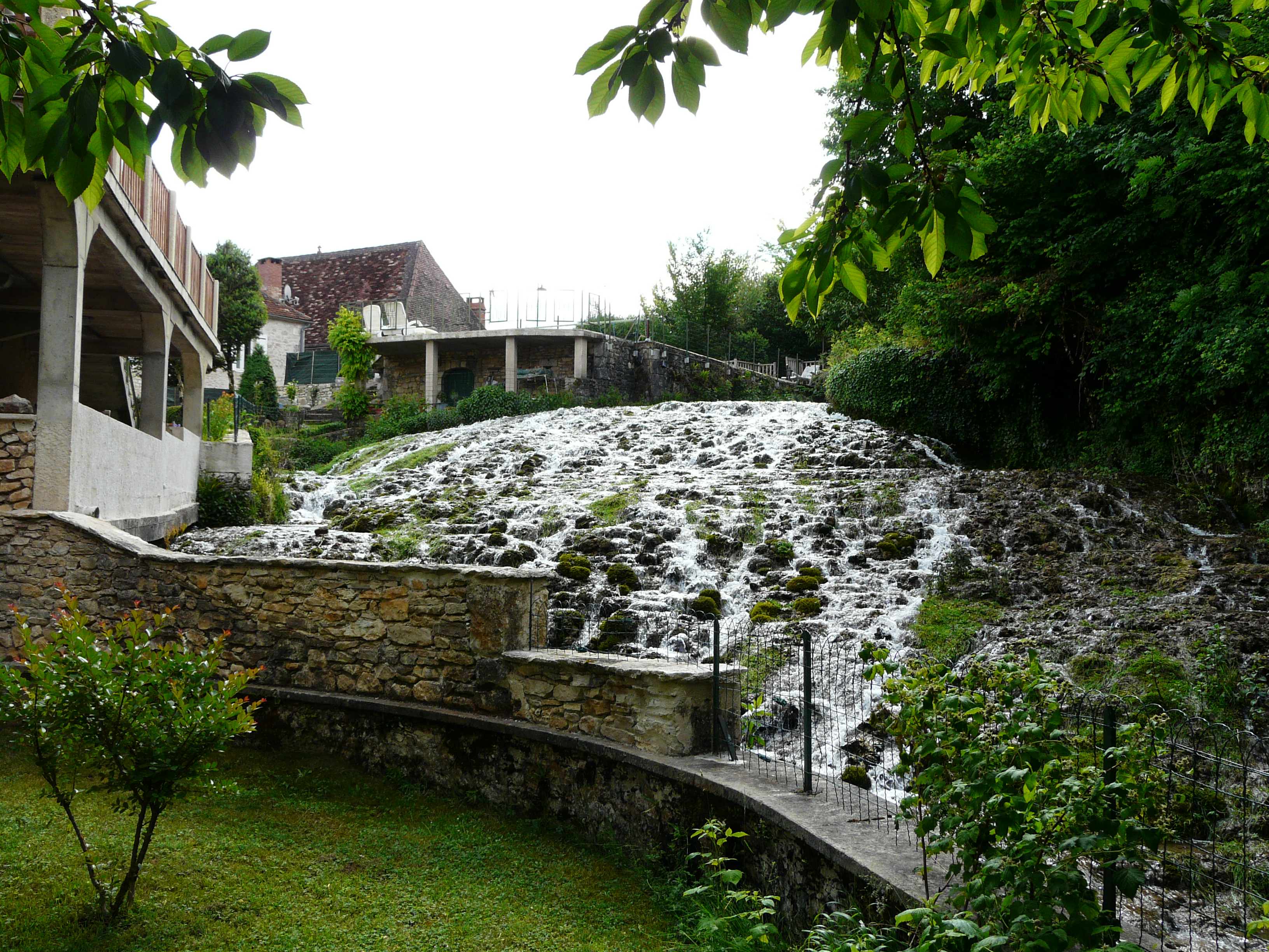 Cascade du Blâme sur du travertin, le long d'un ancien moulin à la Forge d'Ans, La Boissière-d'Ans, Dordogne, France.